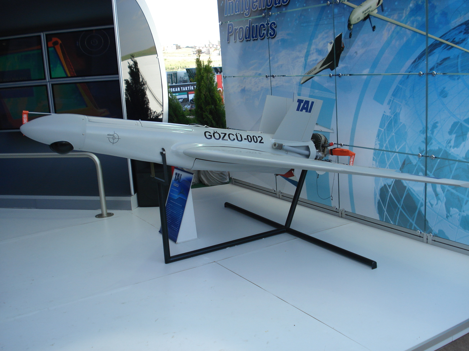 IDEF '07 Savunma Fuarı'nda çekildi.Gözcü IHA (insansız hava aracı). 23 Mayıs 2007